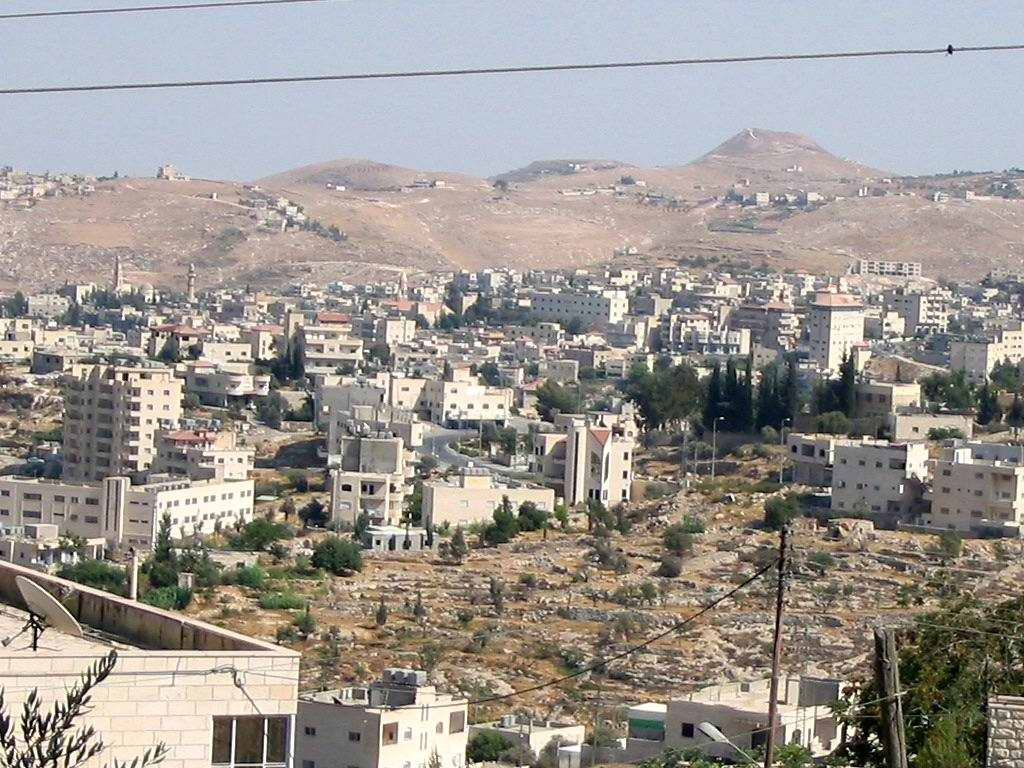 בית סאחור